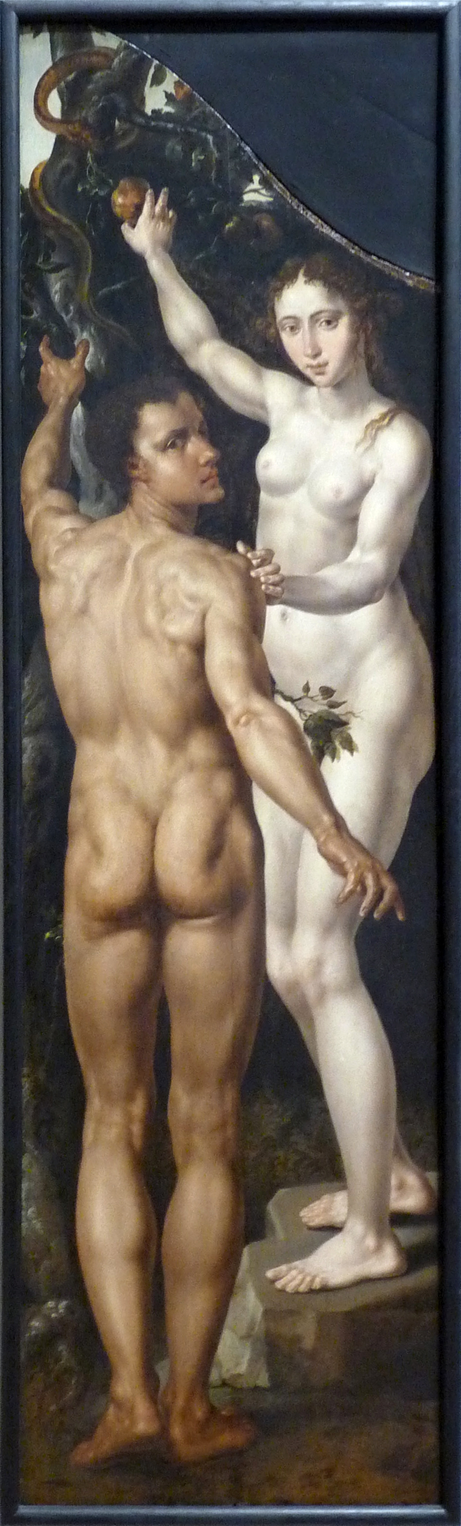 Gédéon ; Adam et Eve (vers 1550), huiles sur bois de Martin van Heemskerck, au Musée des Beaux-Arts de Strasbourg. À l'origine, un tableau (perdu) avec la Vierge était placé entre les deux panneaux.